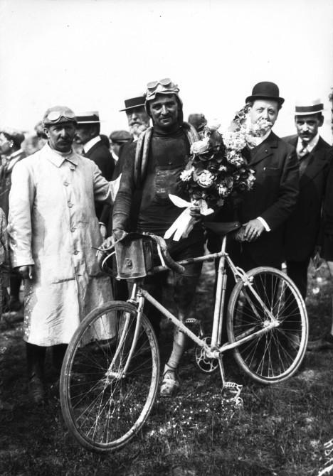 François Faber à l'arrivée du Tour de France 1909